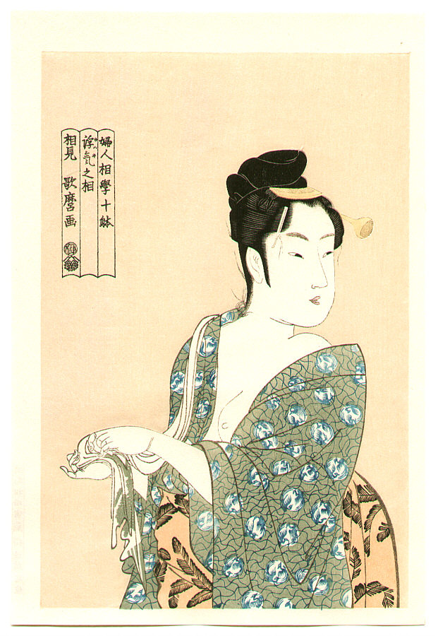 喜多川歌麿「婦人相學十躰-浮気の相」。湯帰りの女性が振り返ったところを描いたもの。女性を引き立たせるために背景に雲母引(キラビキ膠と雲母を混ぜた絵具)が使われている。寛政2～3年（1790-91）。